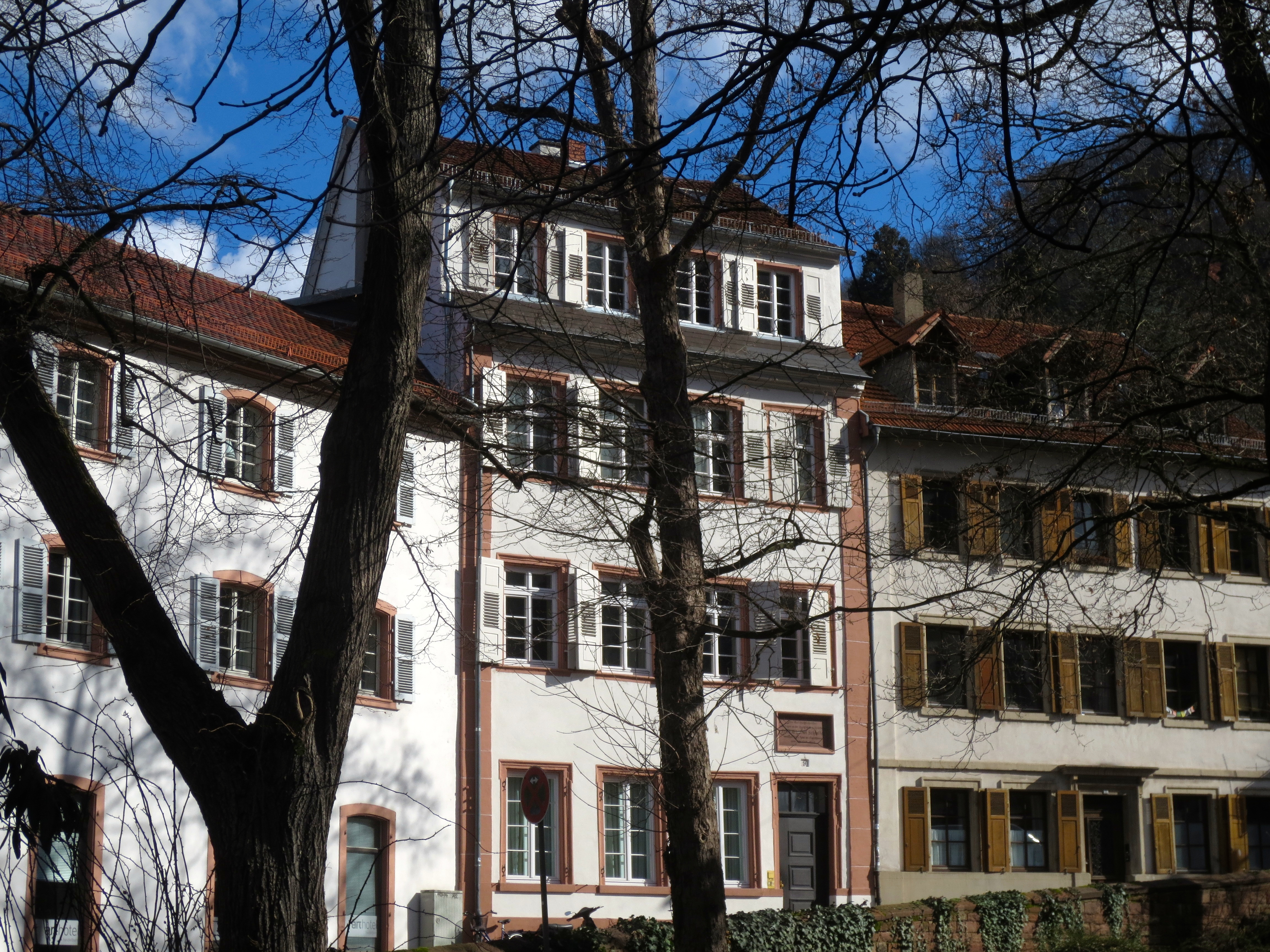 Friedrich Christoph Schlosser, Wohnhaus in Heidelberg, mittleres Gebäude mit der Gedenktafel über der Tür Laibung gegenüber der Apsis der Peterskirche (Heidelberg)